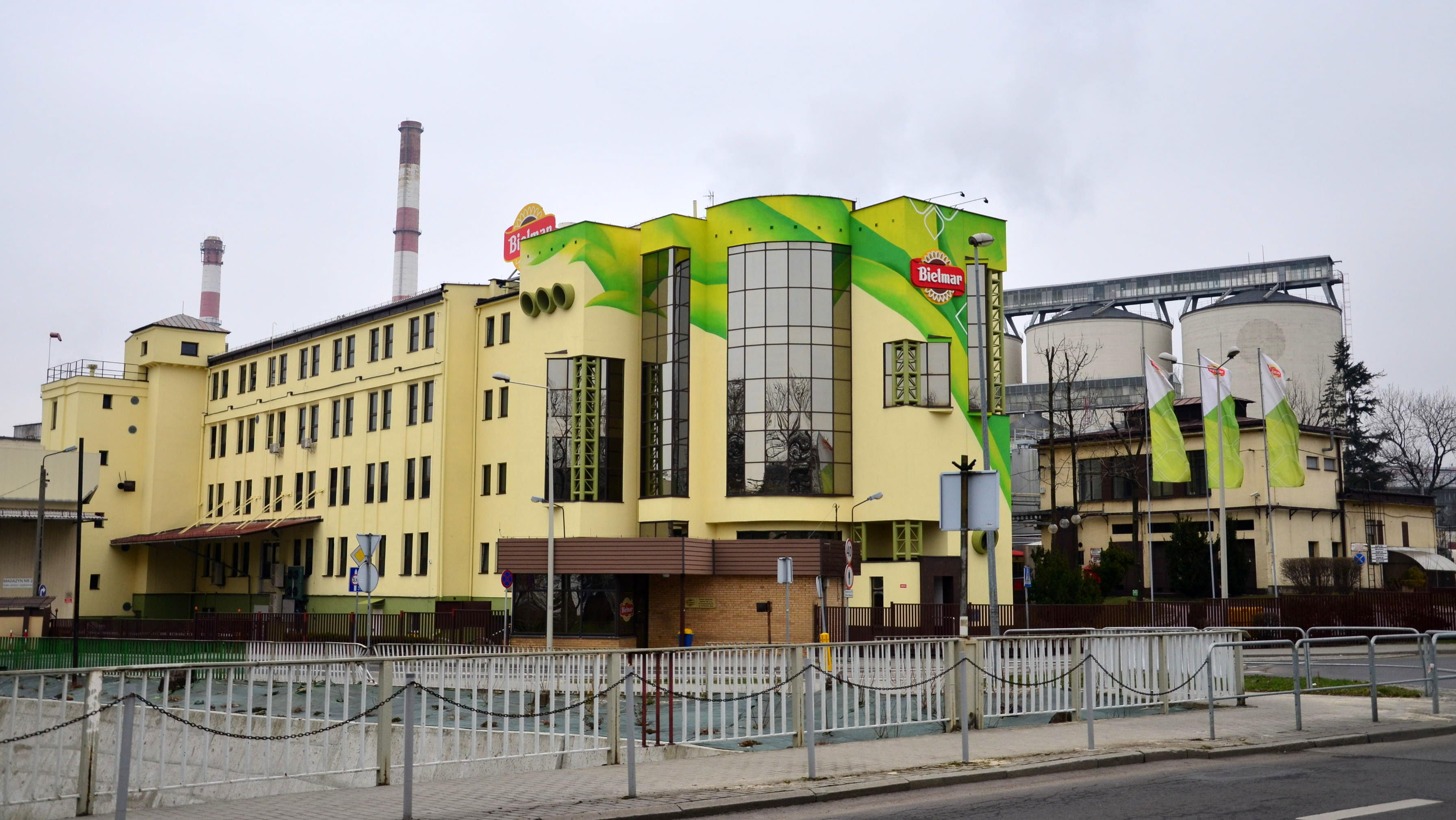 Bielmar